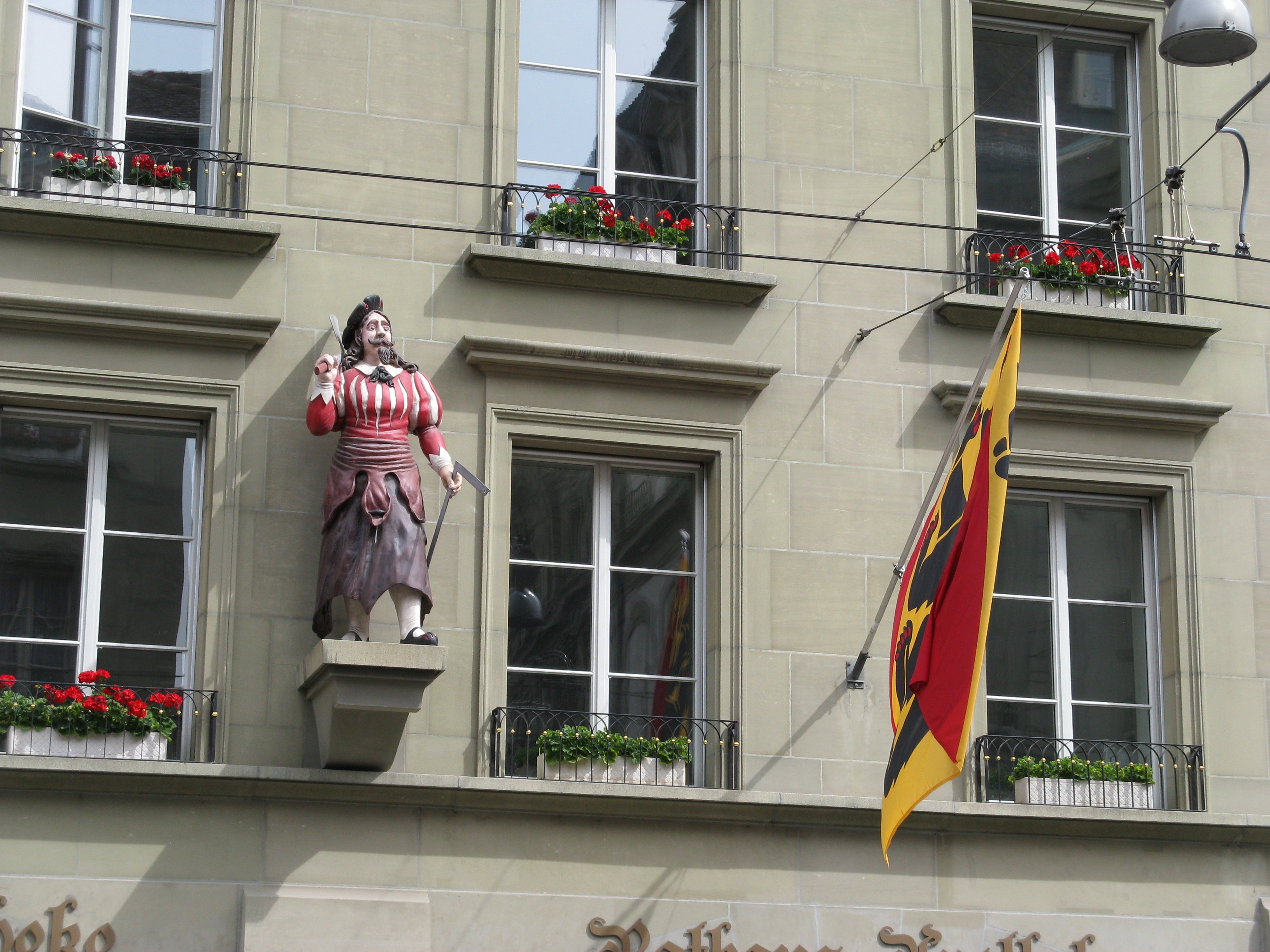 Wappenfigur der Zunftgesellschaft zu Zimmerleuten in der Kramgasse 2 in Bern